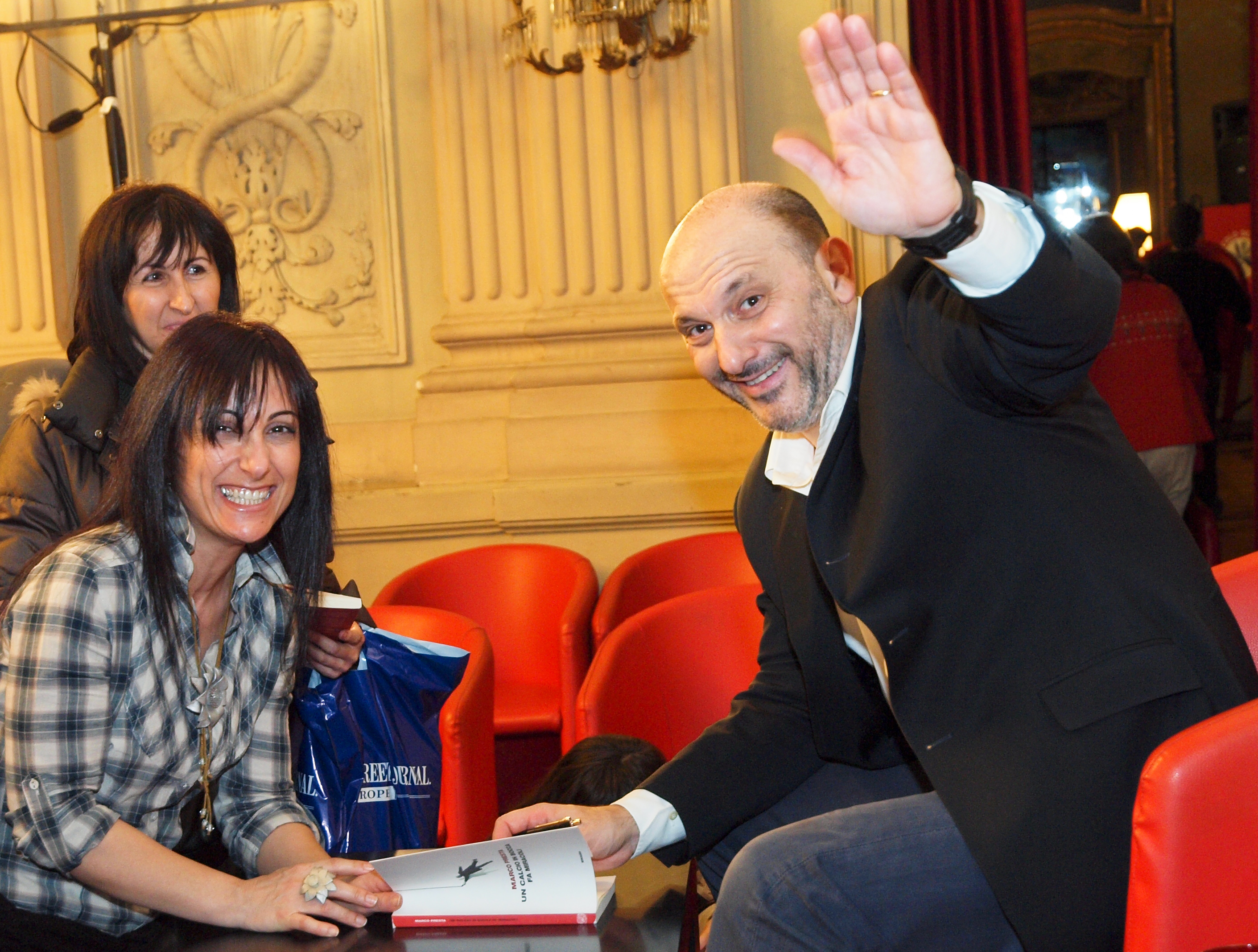 Marco Presta mentre autografa il suo libro "Un calcio in bocca fa miracoli" e saluta il pubblico.